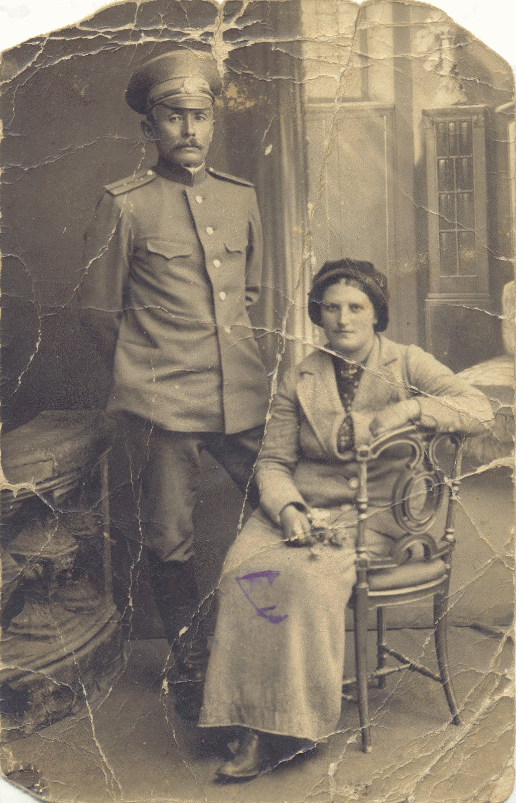 Батьки Шоломянцева-Tерського Олега Саватійовича: Шеломенцев-Терський Савватій Львович і Кучерова Марія Спиридонівна (1915-1916)